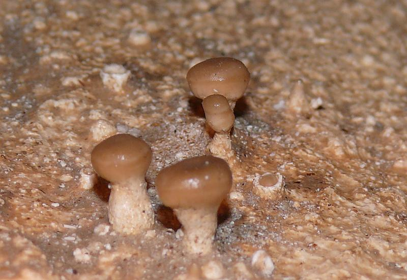 Pilz-Sinter, durch Aerosol abgeschieden